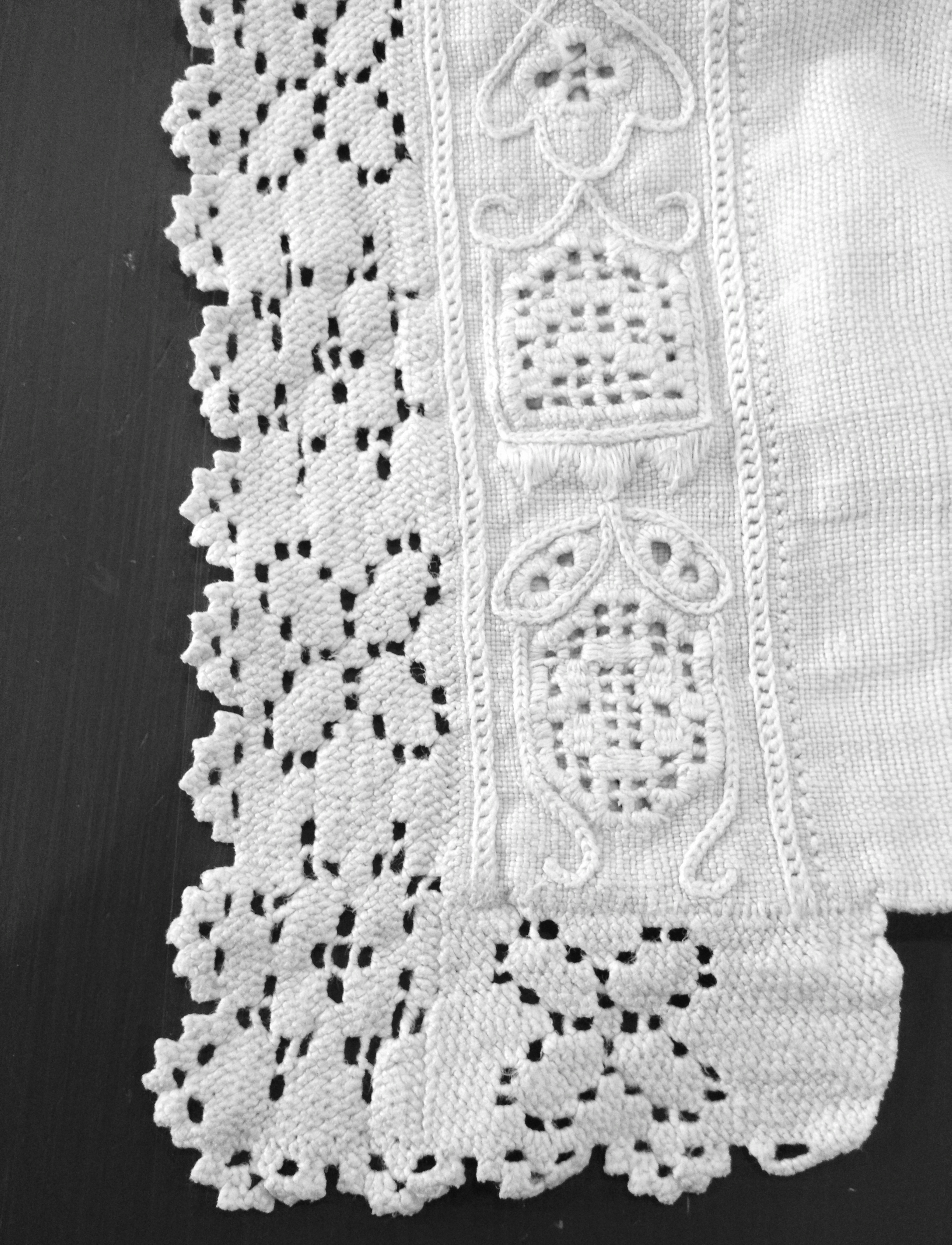 Hedeboblonde. Syet blonde af knaphulsting. Hedebosyning fra perioden ca. 1700